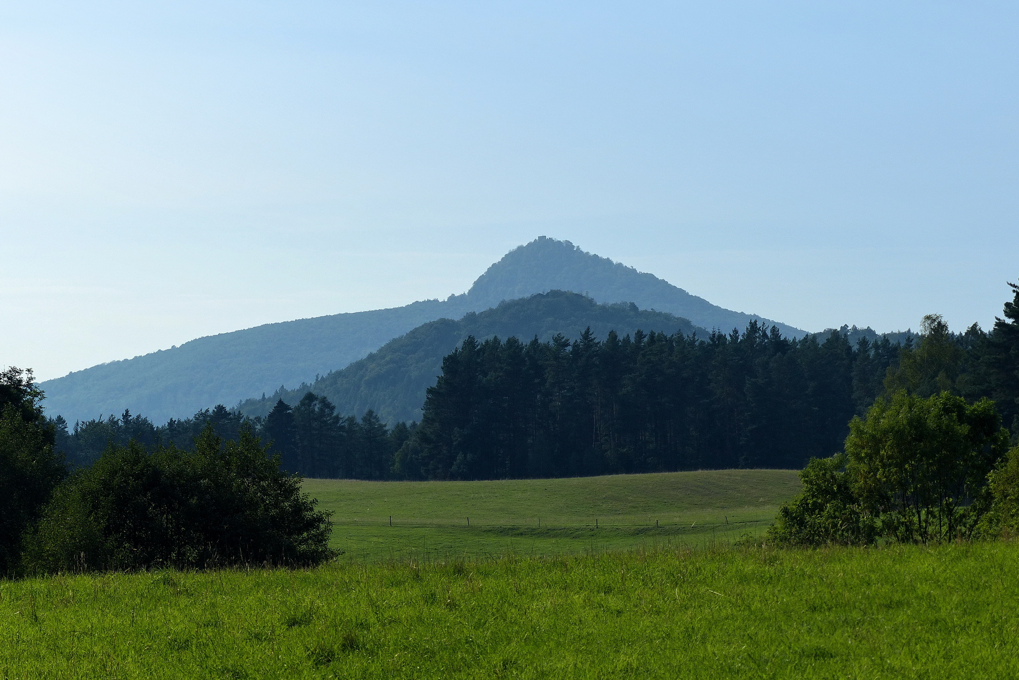 Velký Jelení vrch a Ralsko nad bývalou Černou Novinou